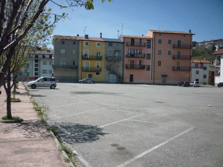 San Giovanni in Fiore - piazza Bainsizza